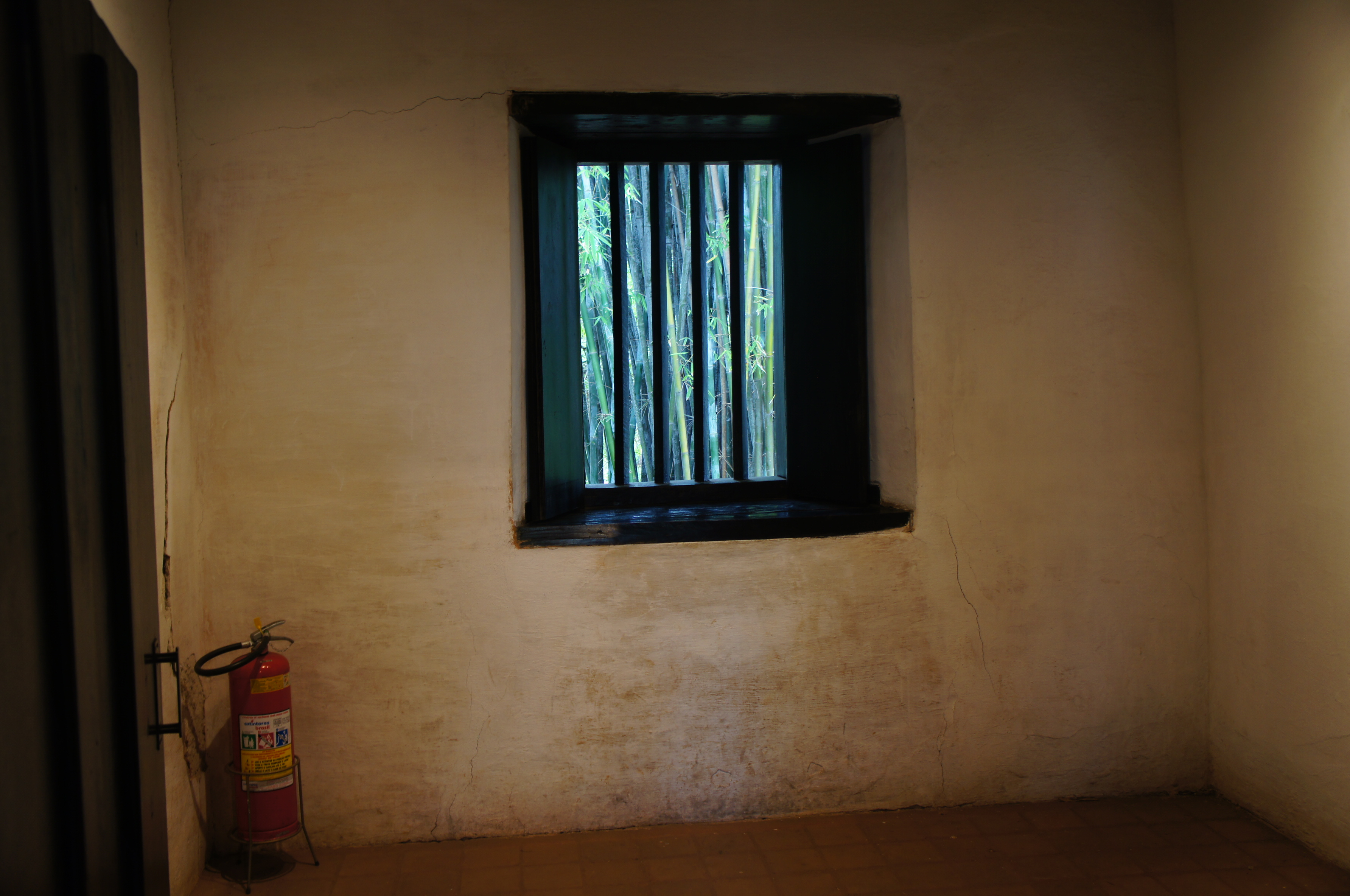 Vista interna de quarto da Casa Sítio da Ressaca, em São Paulo (SP), Brasil.